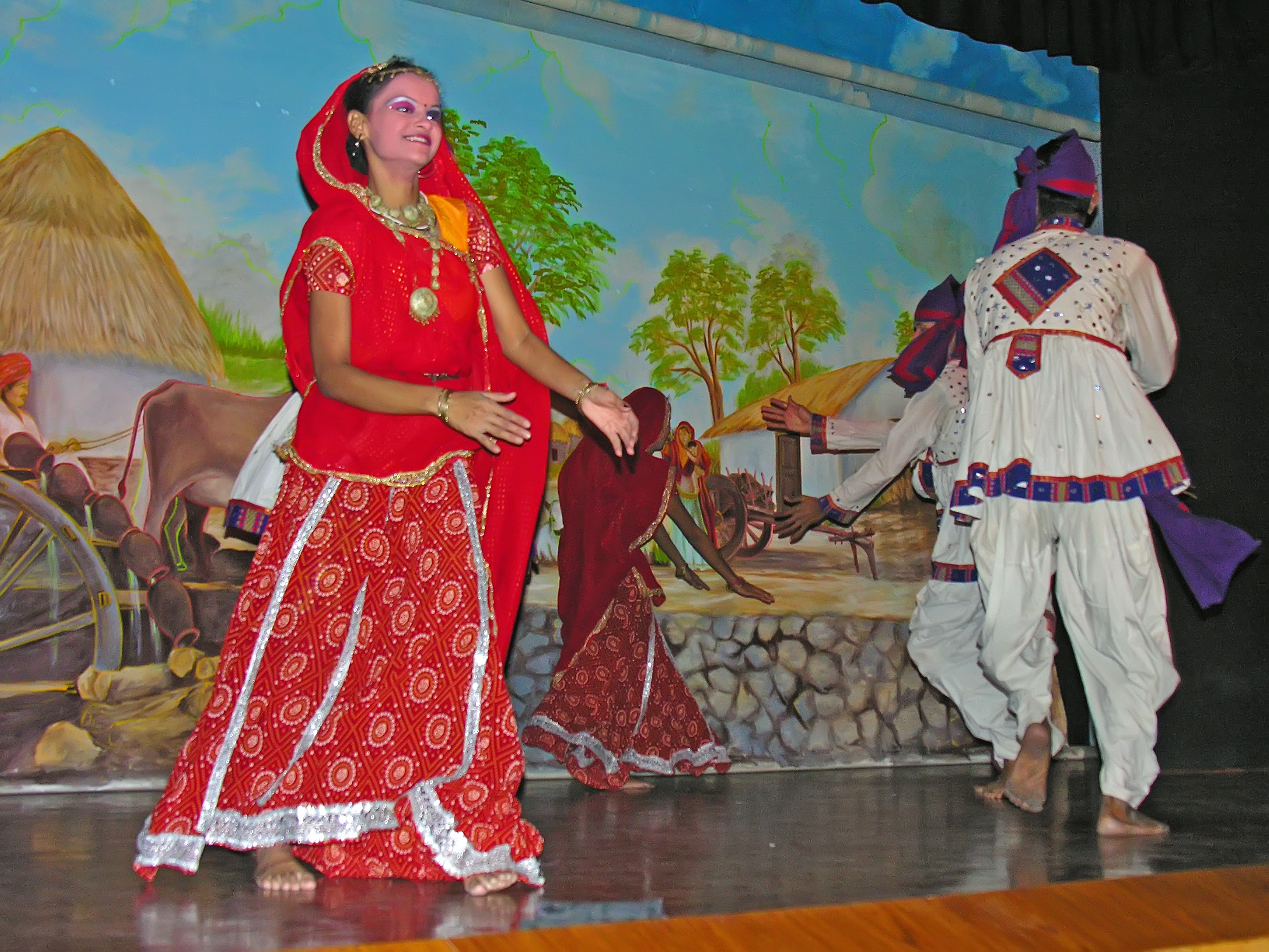 India-5823